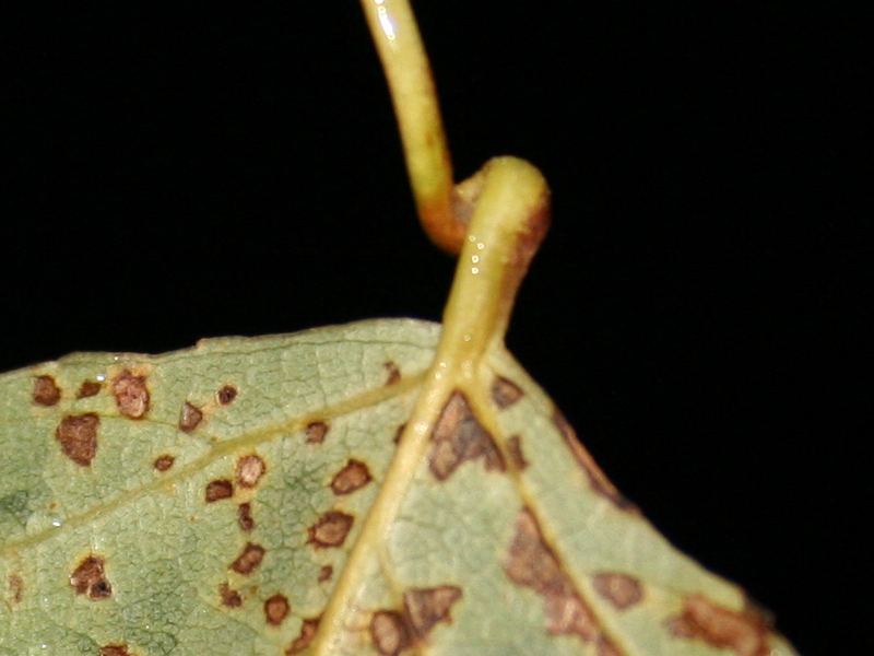 Abgebrochene Gallentwicklung einer pemphigus spirothecae galle im herbst